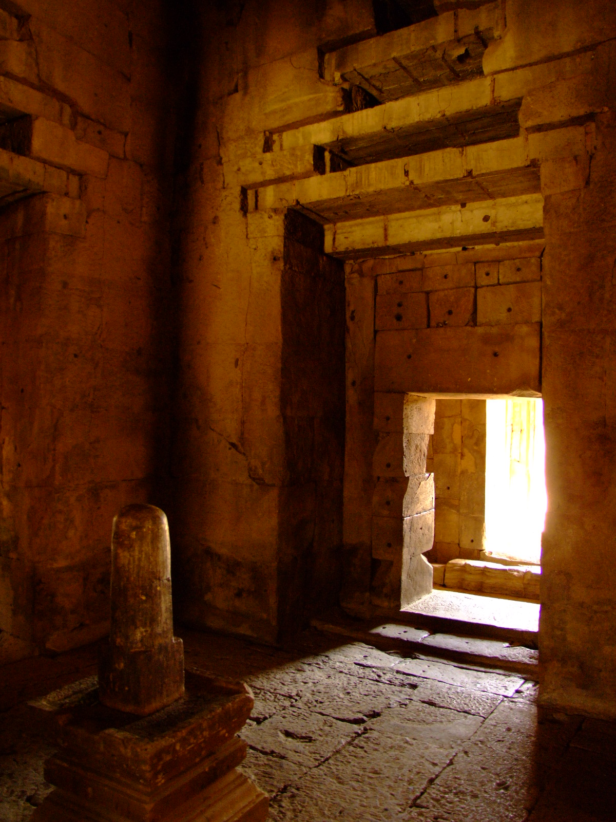 ห้องครรภคฤหะ ปราสาทพนมรุ้ง